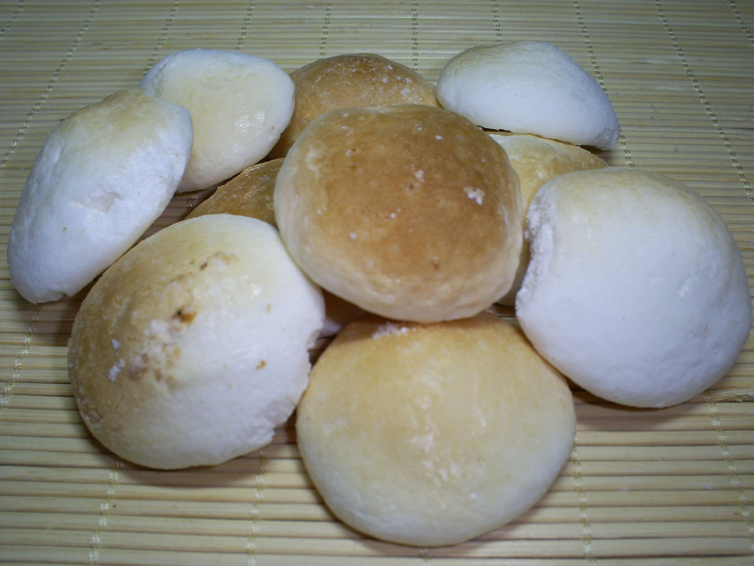 Bolacha ou biscoito de goma (polvilho) de mandioca